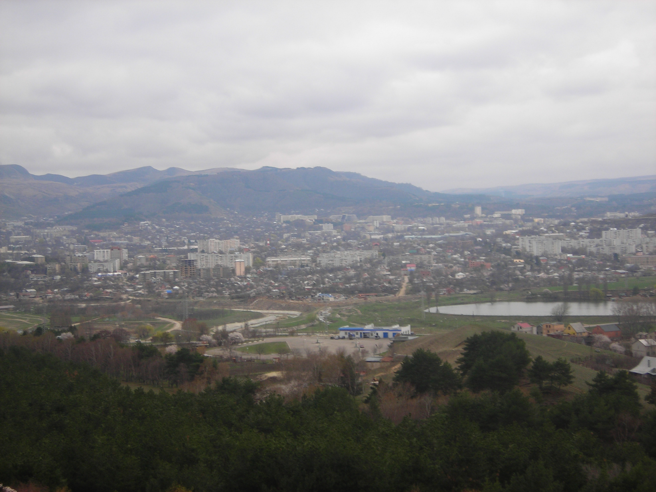 Panorame of Kislovodsk from mt. Koltso-gora